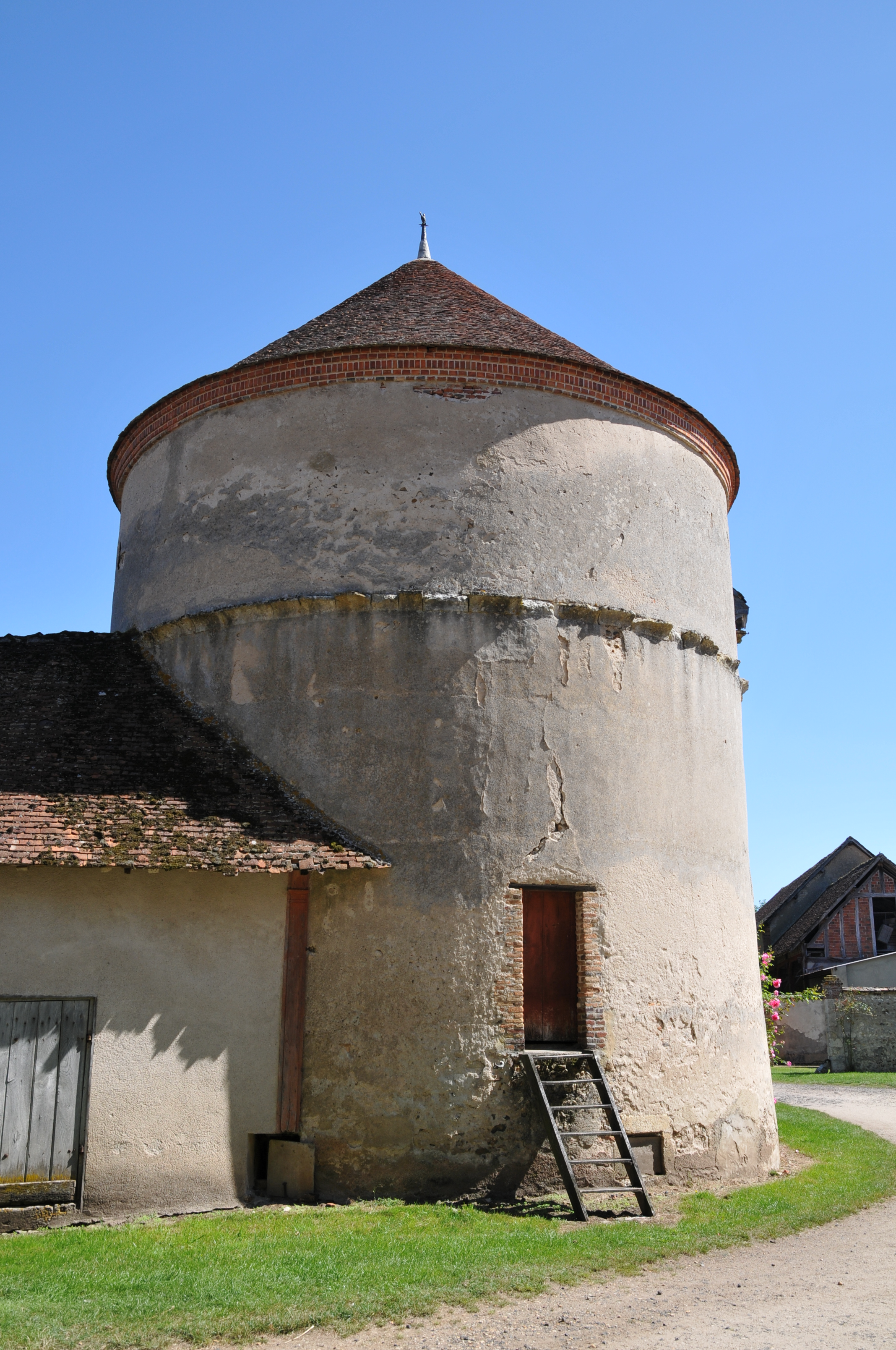 Schloss La Bussière, Taubenturm